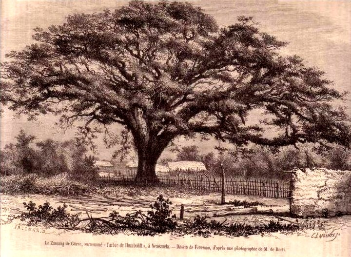 Postal de Samán de Güere